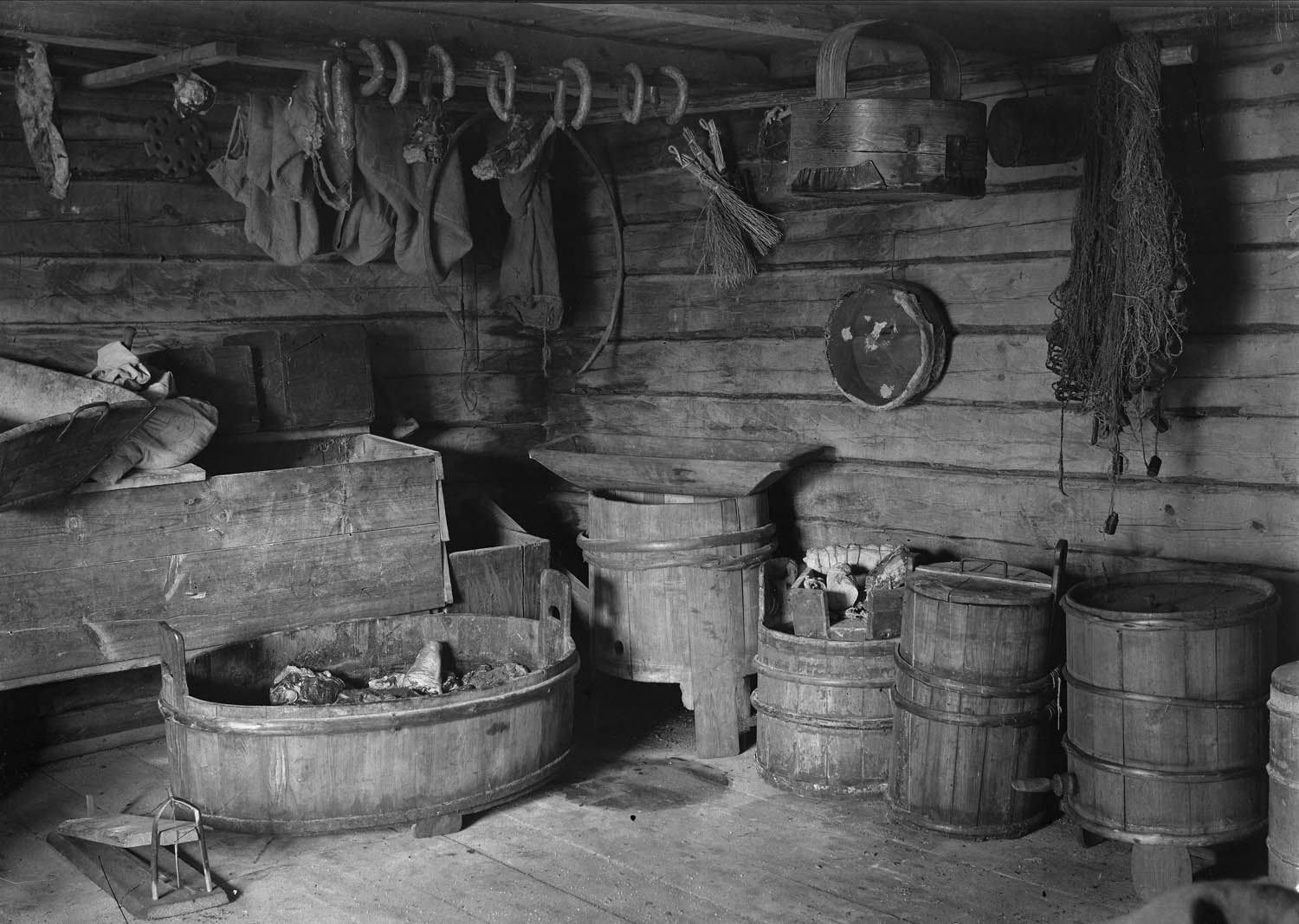 Interiör av matbod. På golvet till vänster står en laggad tina innehållande kött och fläsk. Ett torkat köttstycke och korvar hänga på en stång i taket. Närmast höger vid väggen en dricktunna med svagdricka och tapp samt en spisölhålk med lyftlock. Till vänster en råttfälla. Annat: Utsikt över: Sverige (SE), Värmland Utsikt över: Sverige (SE), Värmland, Jösse hd, Mangskog